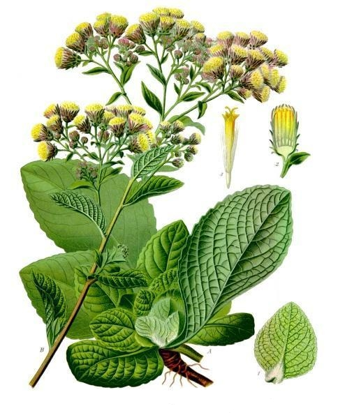 Dürrwurz. A Grundständige Rosette erstjähriger Blätter. B Stengelspitze mit Blütenrispe. 1 jüngeres Blatt der Rosette, mit doppeltem Adernetz; 2 Blütenkörbchen, Längsschnitt; 3 Scheibenblüte. A B etwas verkleinert. 1 natürliche Grösse. 2—3 vergrössert.